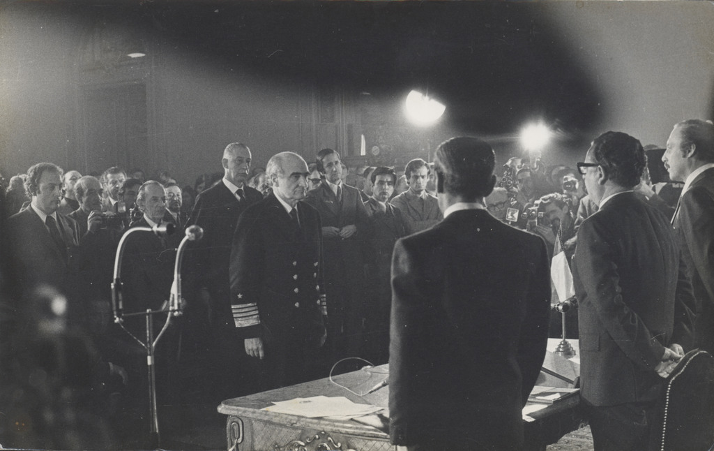 José Cademártori en un cambio de Gabinete del Gobierno de Salvador Allende. En la fotografía aparece el Almirante Raúl Montero, Orlando Letelier y Salvador Allende, entre otros personajes políticos.